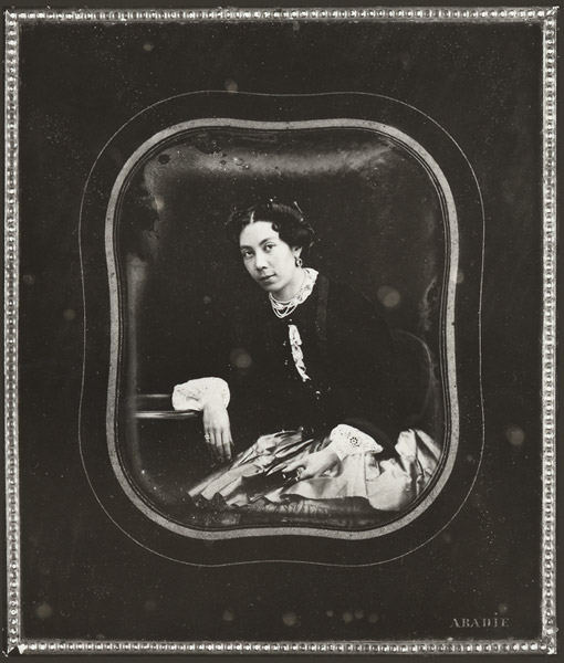 София Васильевна Сухово-Кобылина (1825 — 1867), сестра драматурга А.В.Сухово-Кобылина